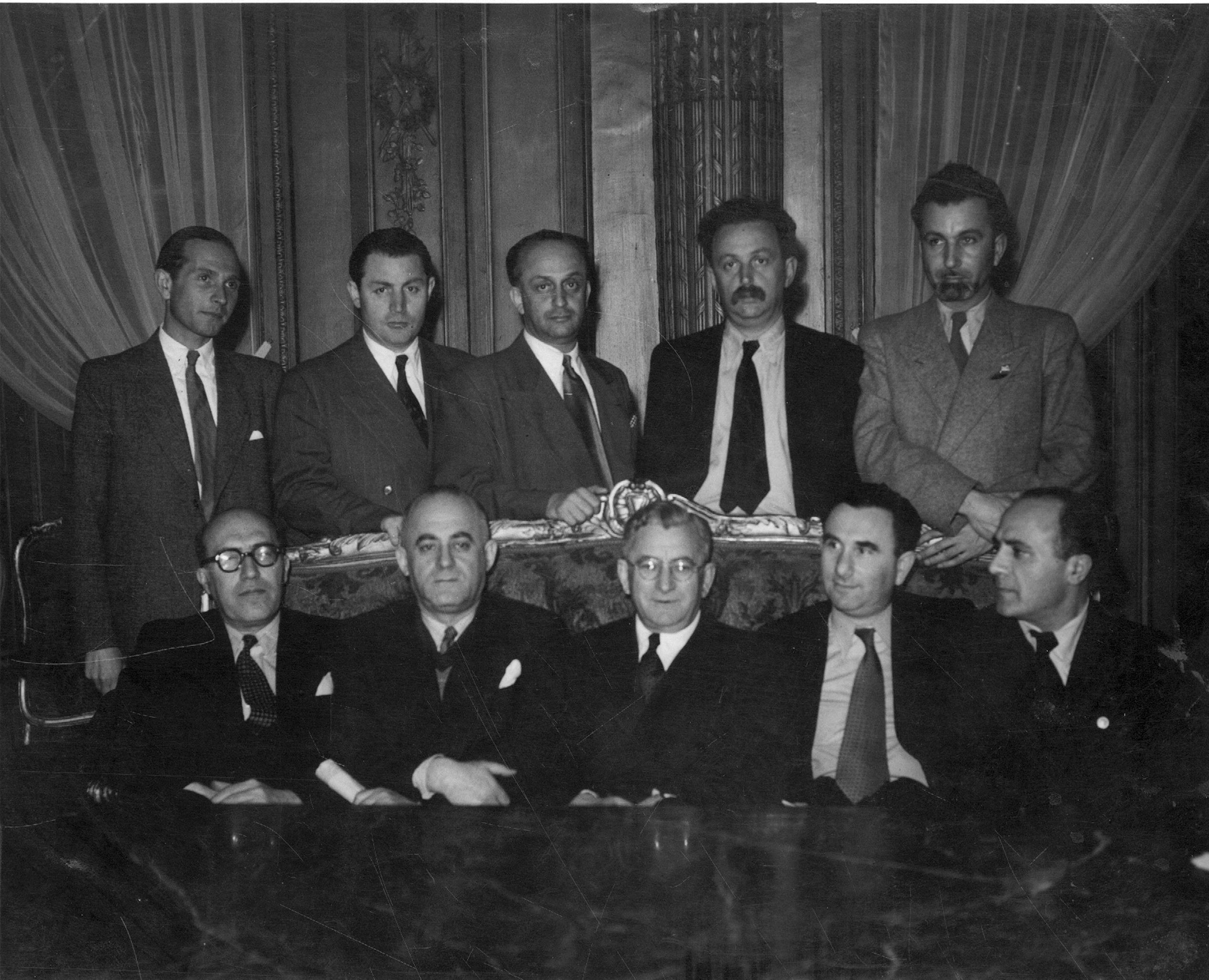 חברי הוועד הפועל העולמי של ברית הצה"ר בפריז. שורת העומדים (מימין): ד"ר ראובן הכט, ד"ר שמשון יוניצ'מן, ד"ר דוד בוקשפן, אליעזר שוסטק, עמנואל כהן. שורת היושבים: (מימין): אהרן צבי פרופס, יעקב רובין, מאיר גרוסמן, ד"ר אריה אלטמן, ברוך וינשטיין. (1948)